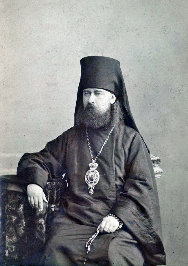 Епископ Саратовский и Царицынский Николай (Налимов)